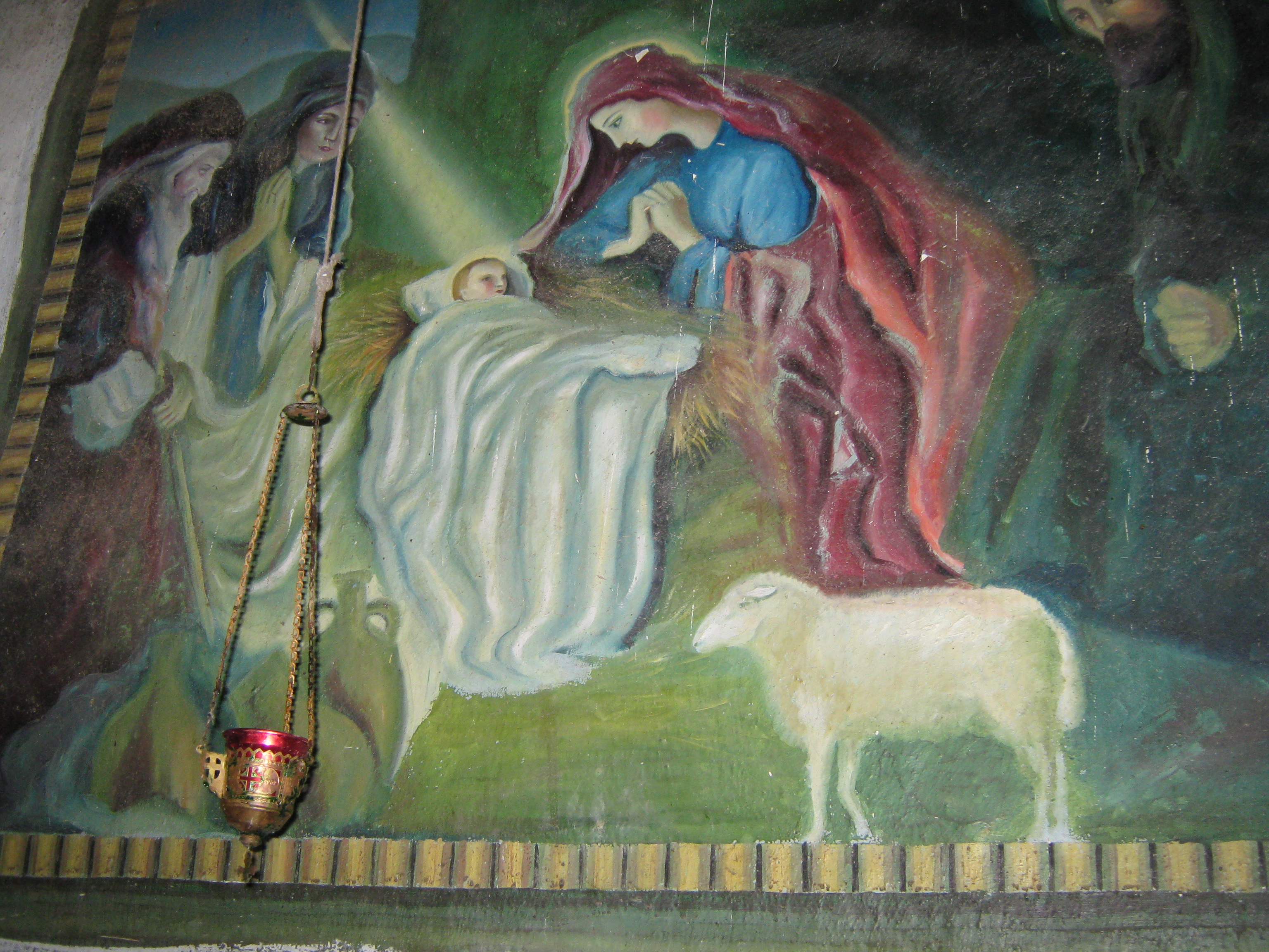 Freska Hristovo rođenje, crkva sv. Jovana u Mačkatici